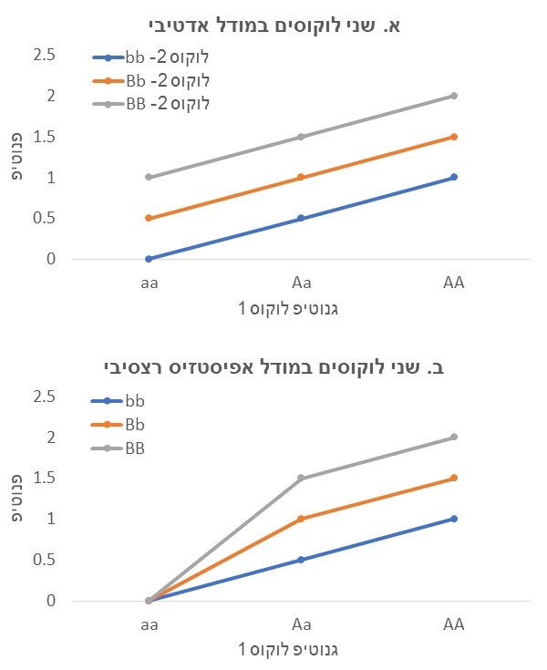 מודלים המתארים שינוי בפנוטיפ כתלות בשני גנים. גרף א' מתאר תכונה המורשת במודל אדטיבי בלבד כשכל אלל דומיננטי תורם 0.5 (יח' שרירותיות). גרף ב מתאר תכונה המורשת במודל אפיסטזיס רצסיבי.